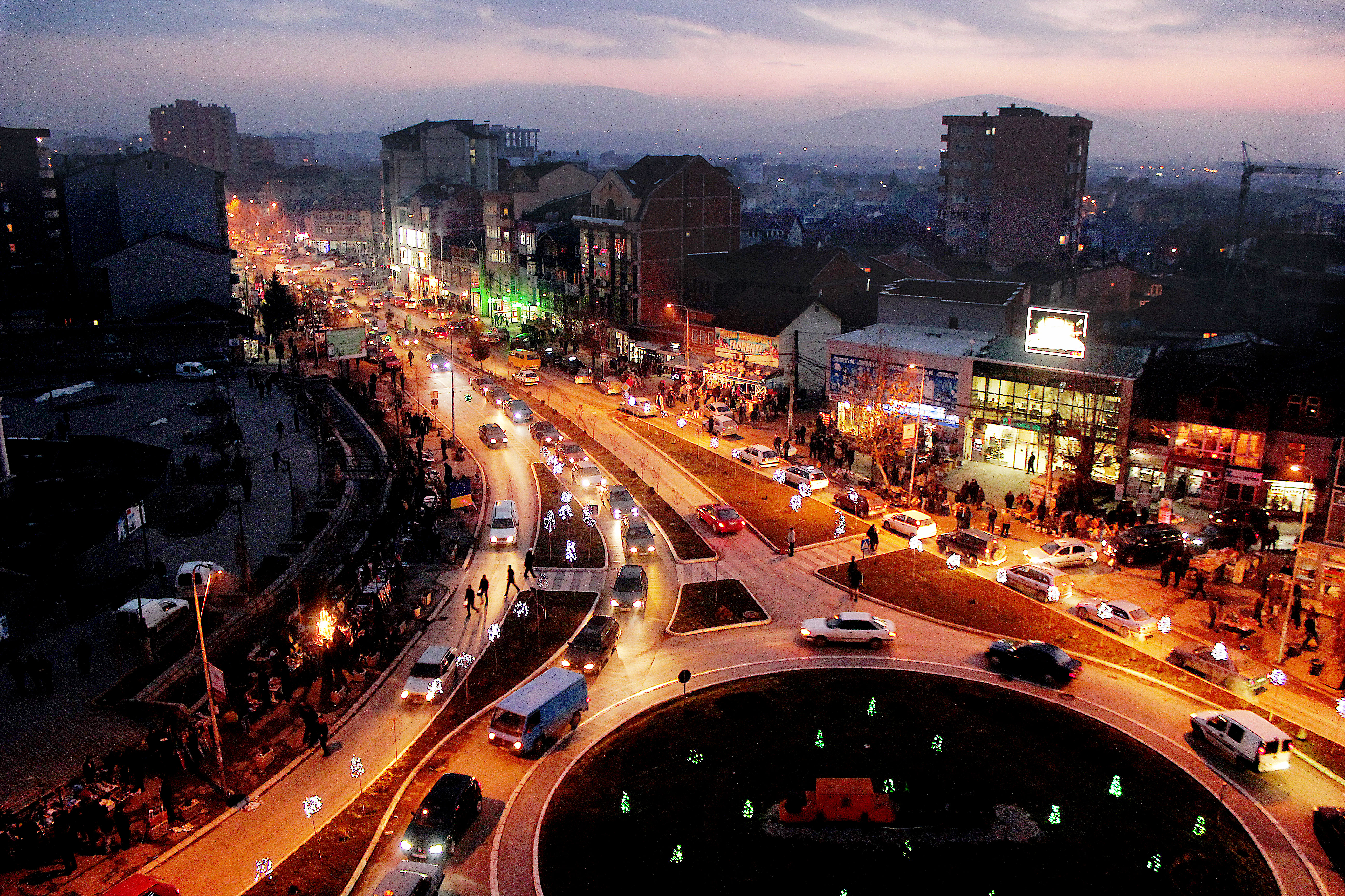 Pamje e qendrës së qytetit të Mitrovicës, gjatë natës.